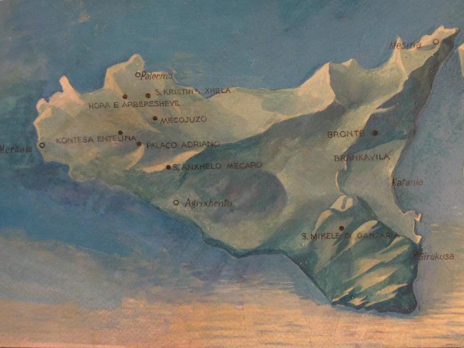 Parte della mappa delle Colonie Albanesi d'Italia, sezione della diaspora albanese, Museo Nazionale Giorgio Castriota Scanderbeg, Croia-Kruja, Albania.